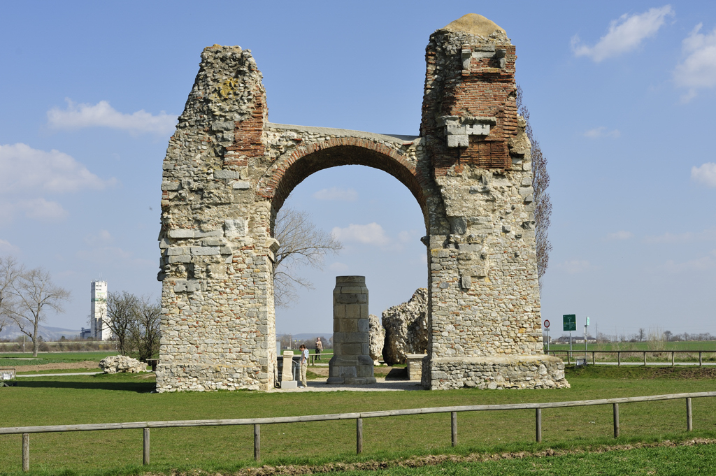 Heidentor in Carnuntum